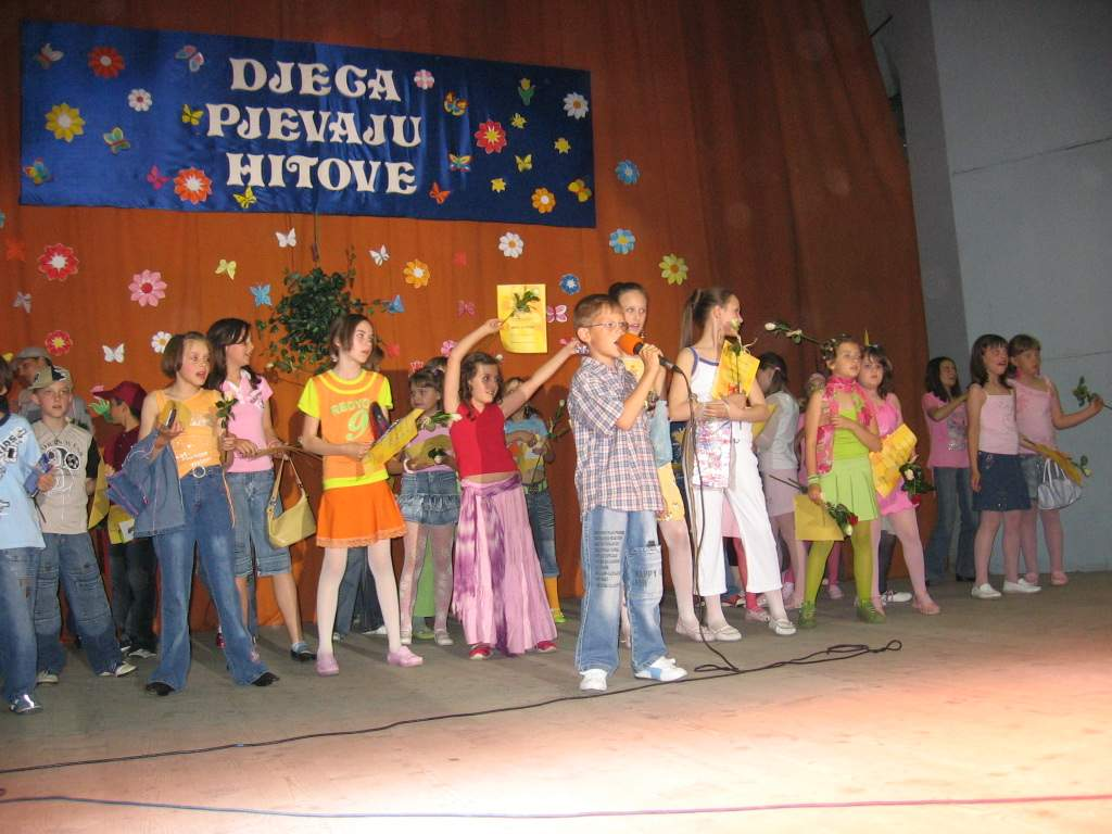 Djeca pjevaju hitove, Beli Manastir, 18. V. 2006.